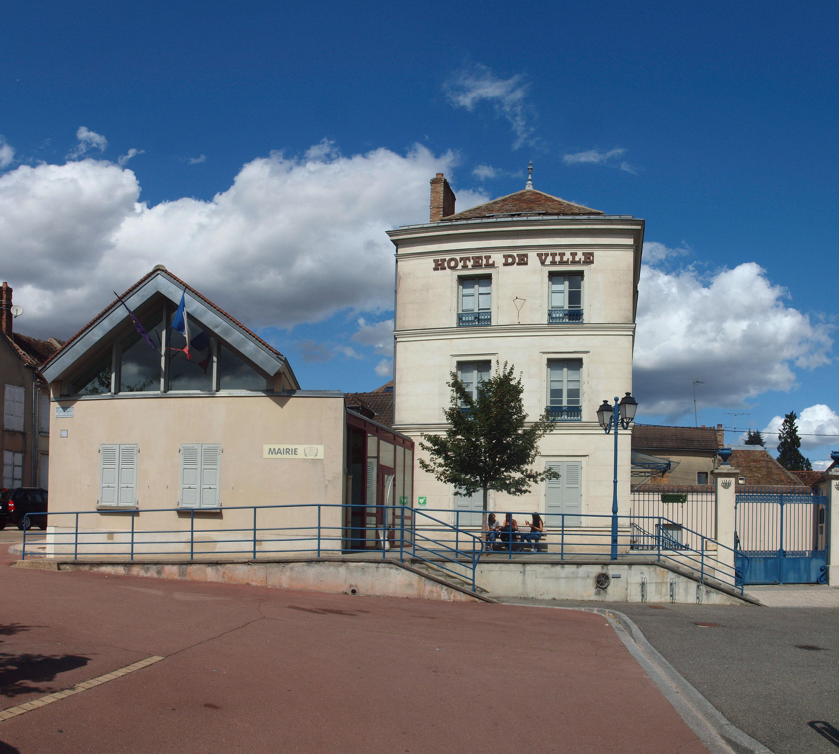 Mairie de Villeneuve-la-Guyard (Yonne, France) ; image obtenue par assemblage panoramique de photos.